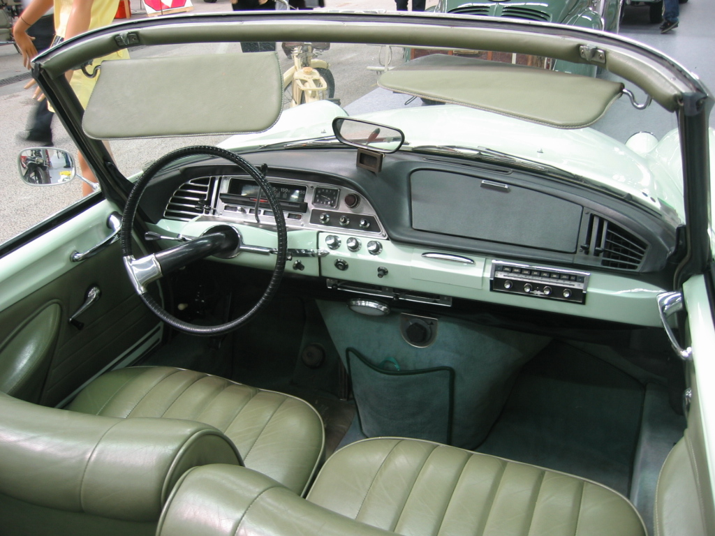 Citroen DS cabriolet